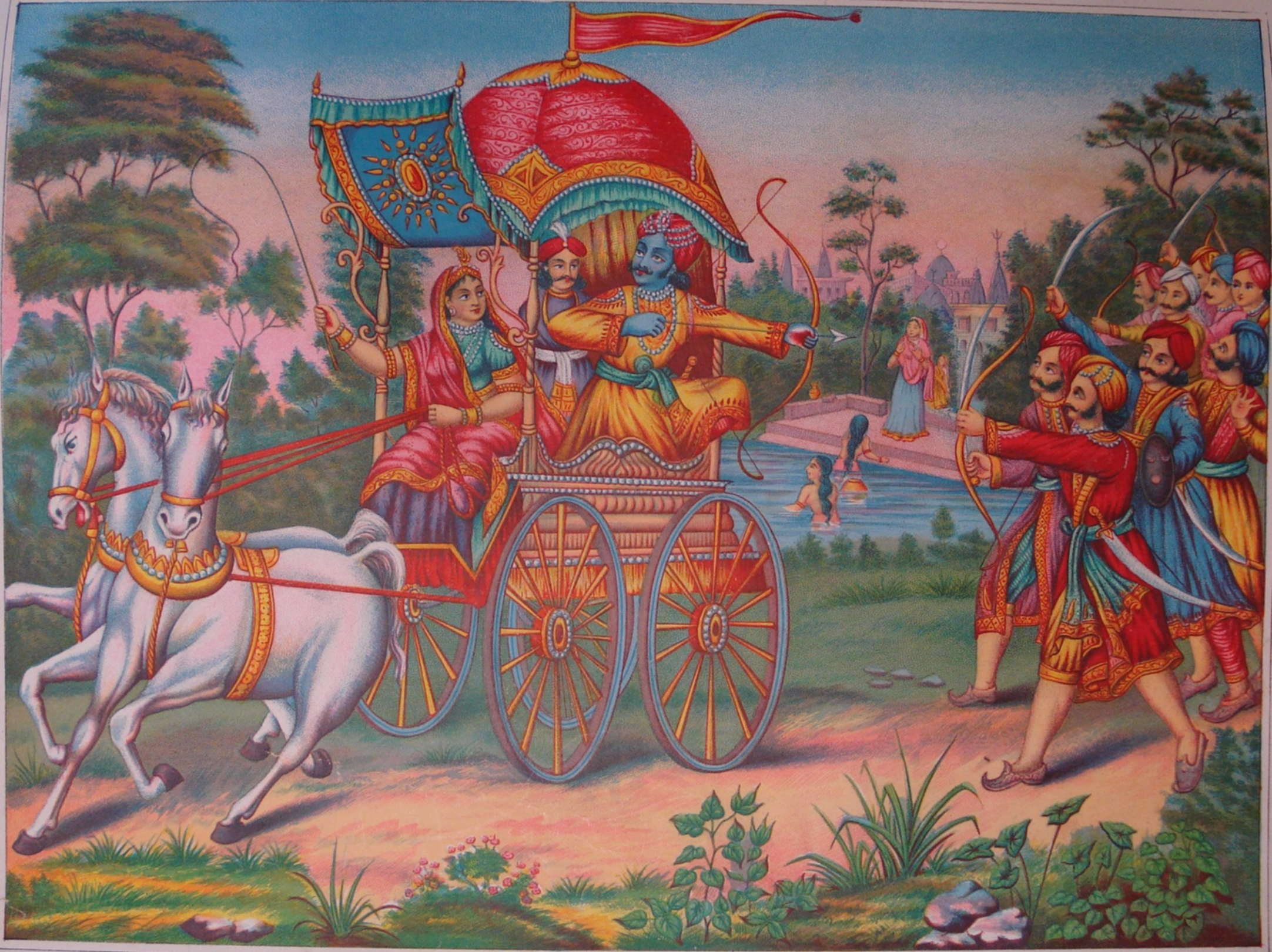 Object types=popular print album Materials=textile paper Techniques=lithograph Production person=Printed by Chore Bagan Art Studio (biographical details